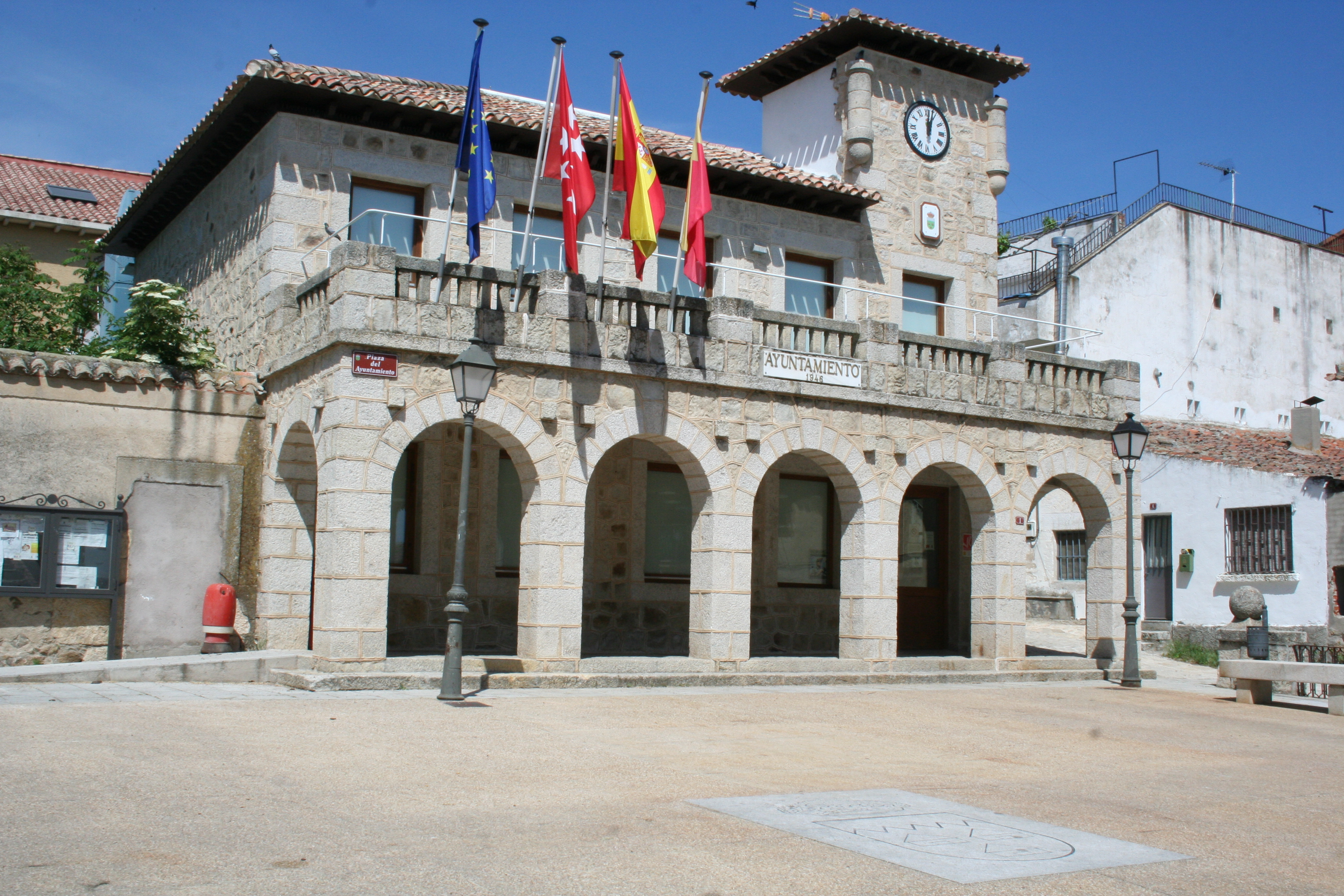 Ayuntamiento de Cabanillas de la Sierra